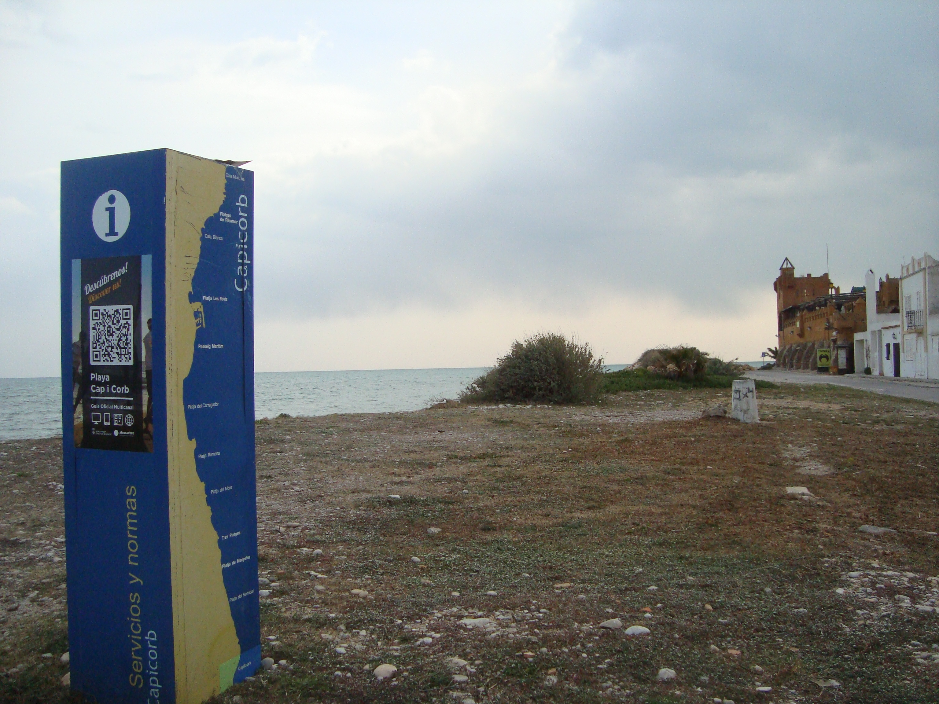 Platja de Capicorb, Alcalà de Xivert